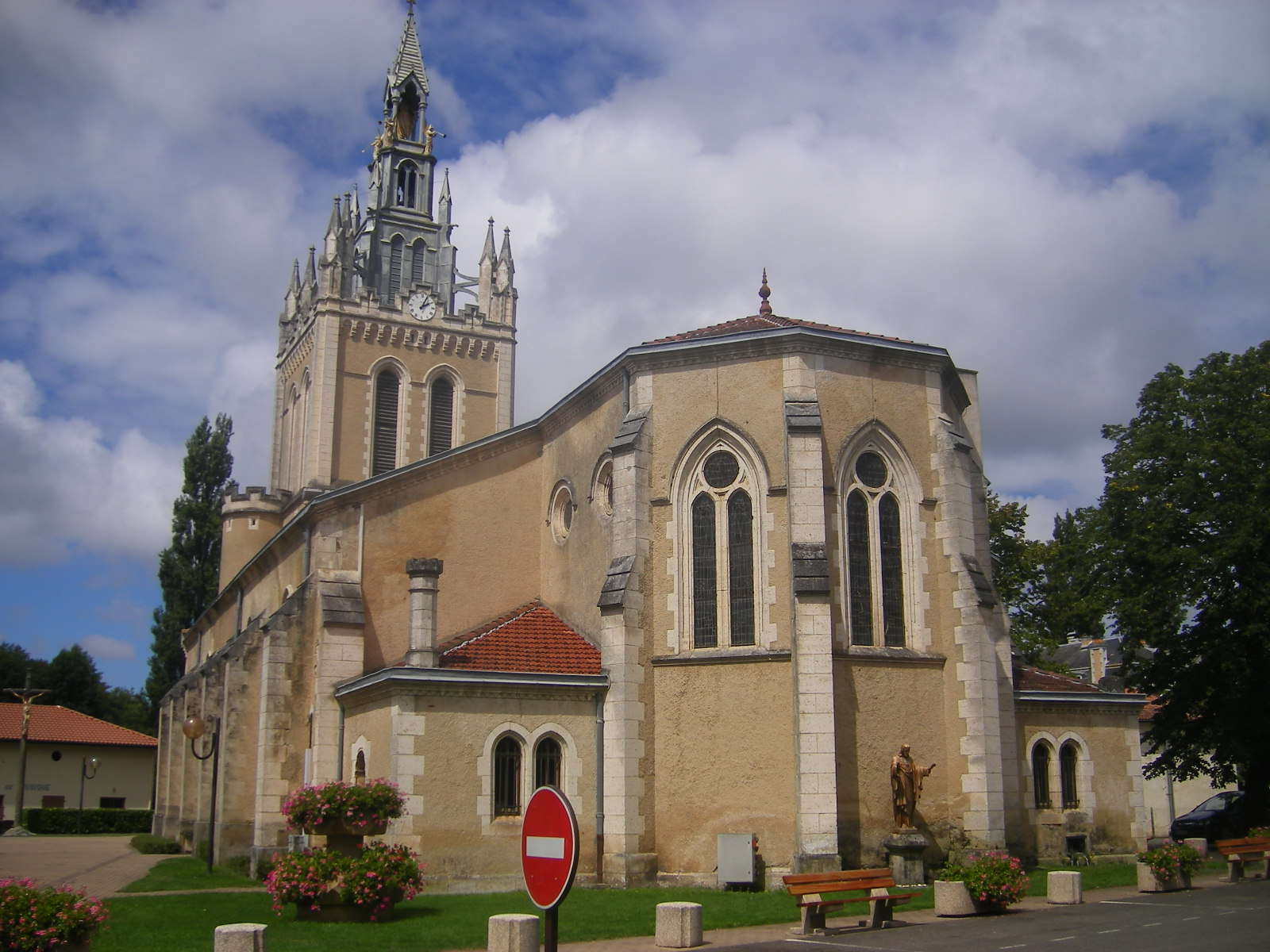 Lit-et-Mixe